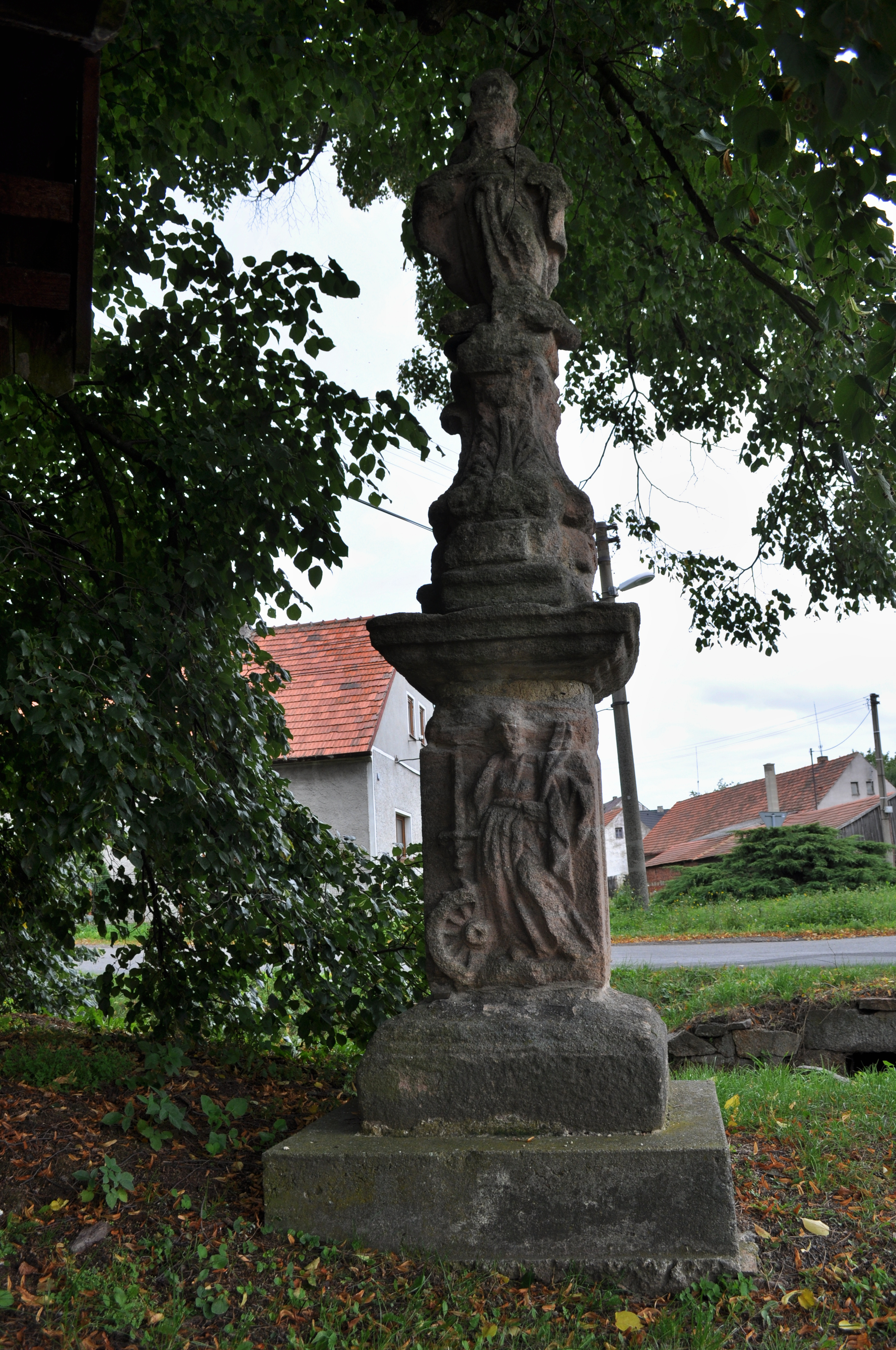 Socha sv. Prokopa, Zdeslav